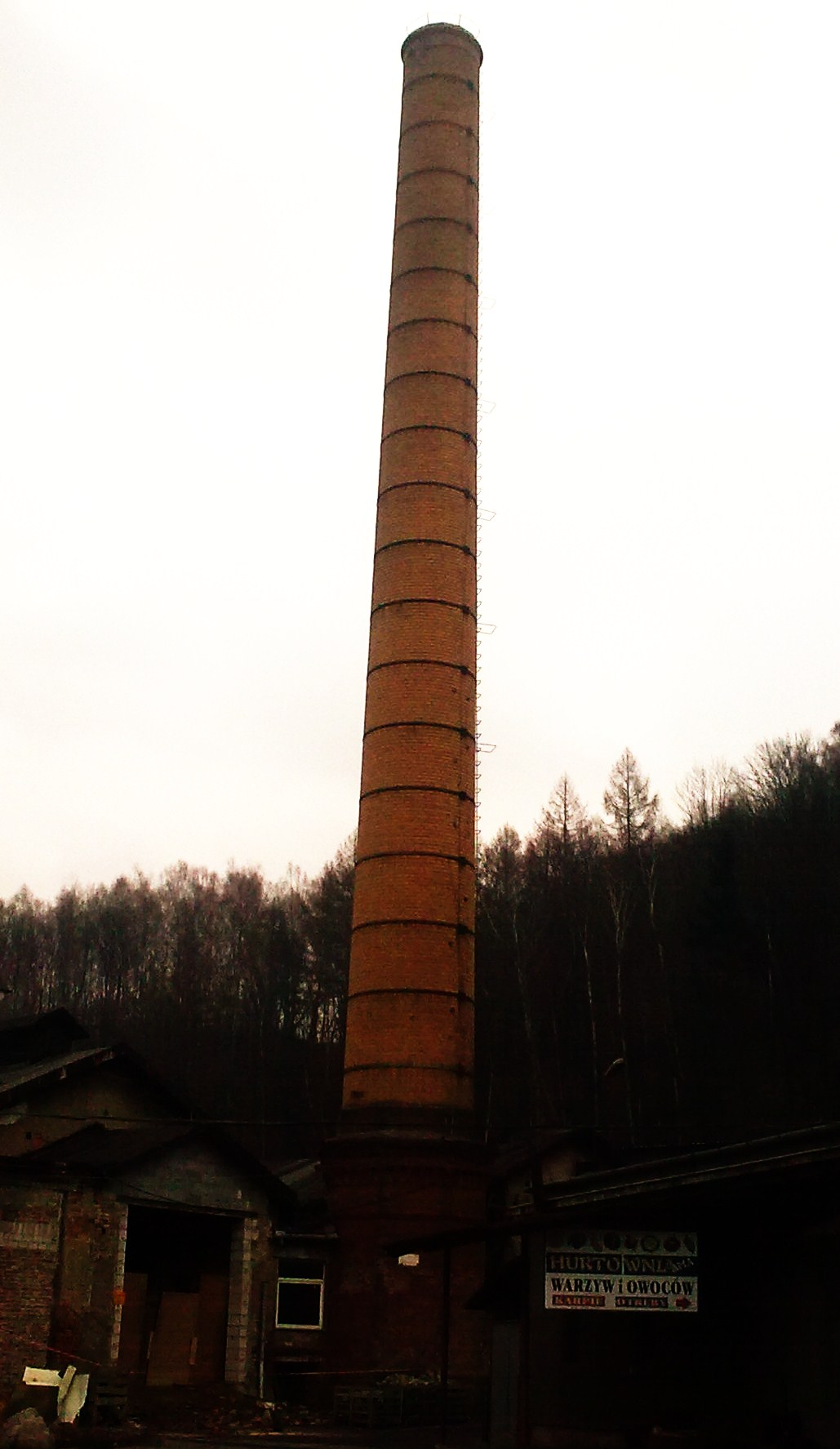 DZPJ w Nowej Rudzie. Komin